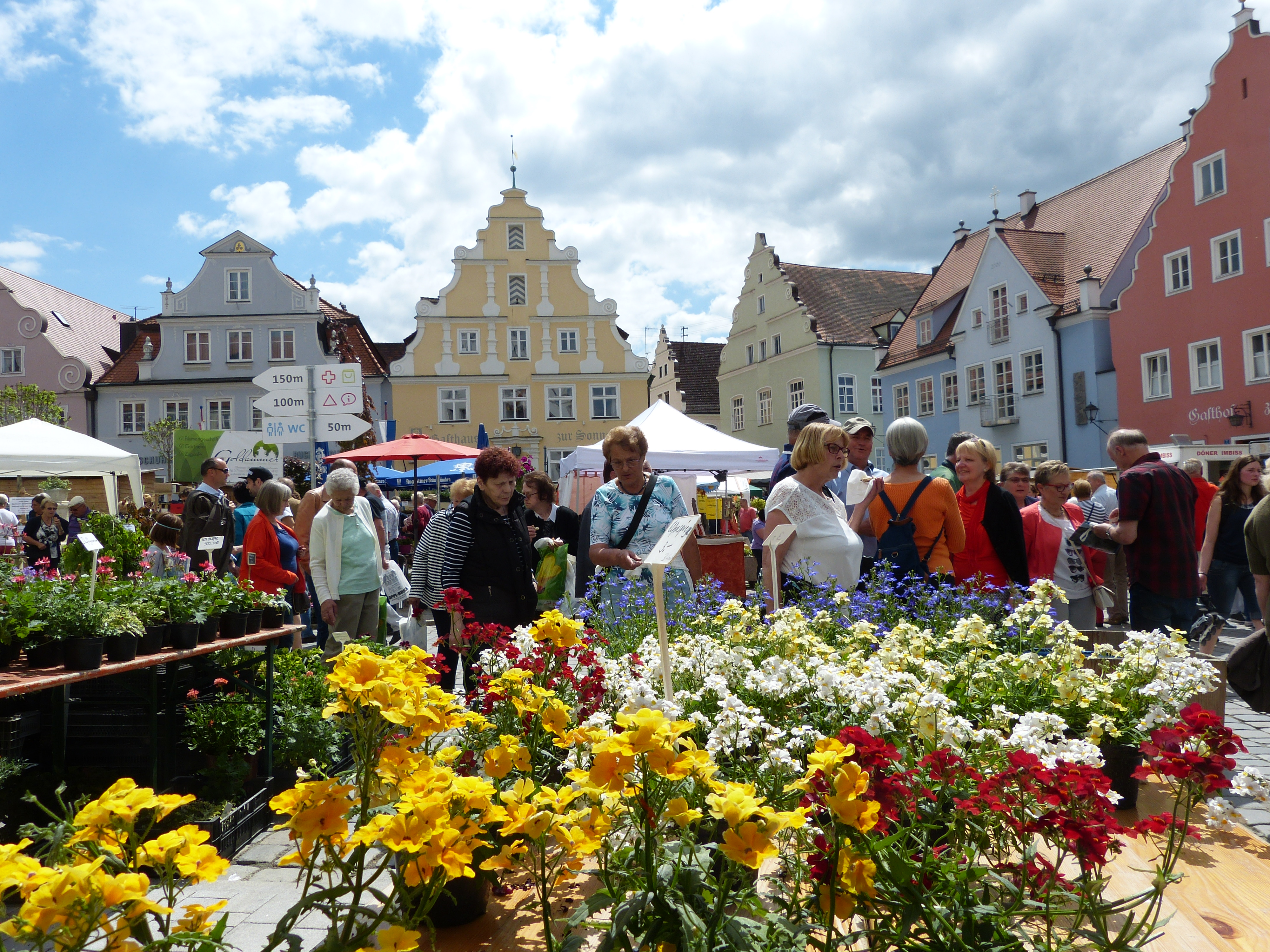 Fuchsien- und Kräutermarkt in Wemding